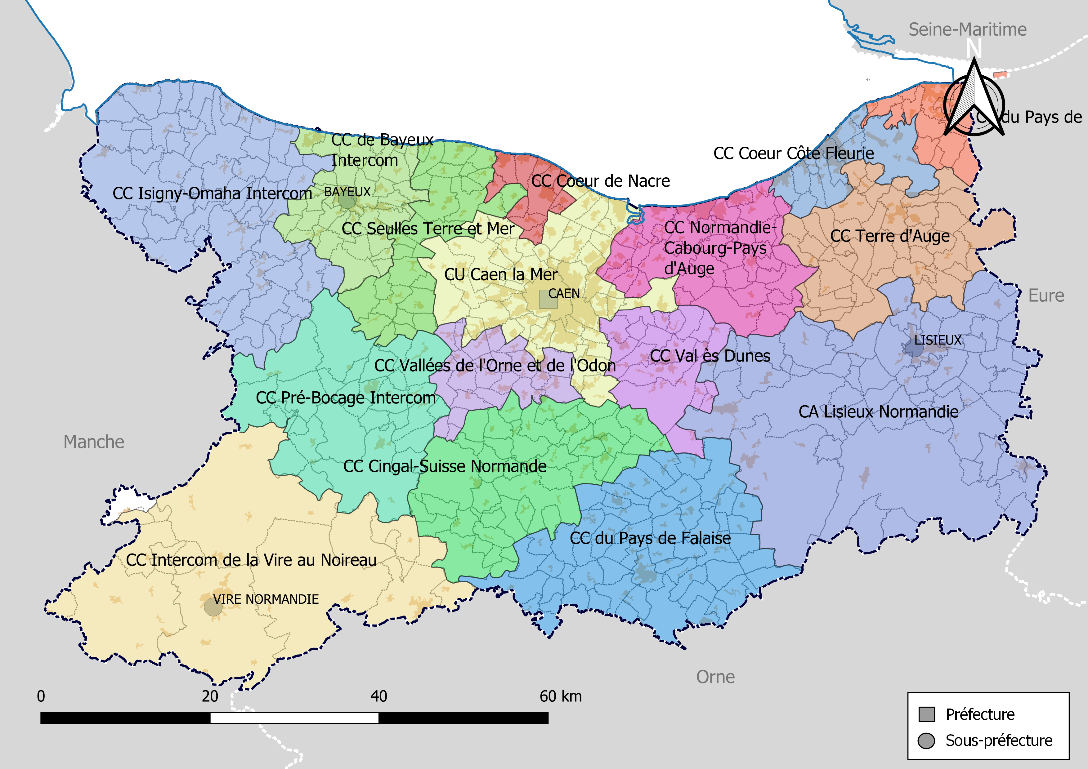 Carte des intercommunalités du département du Calvados, France. Composition au 1er janvier 2019